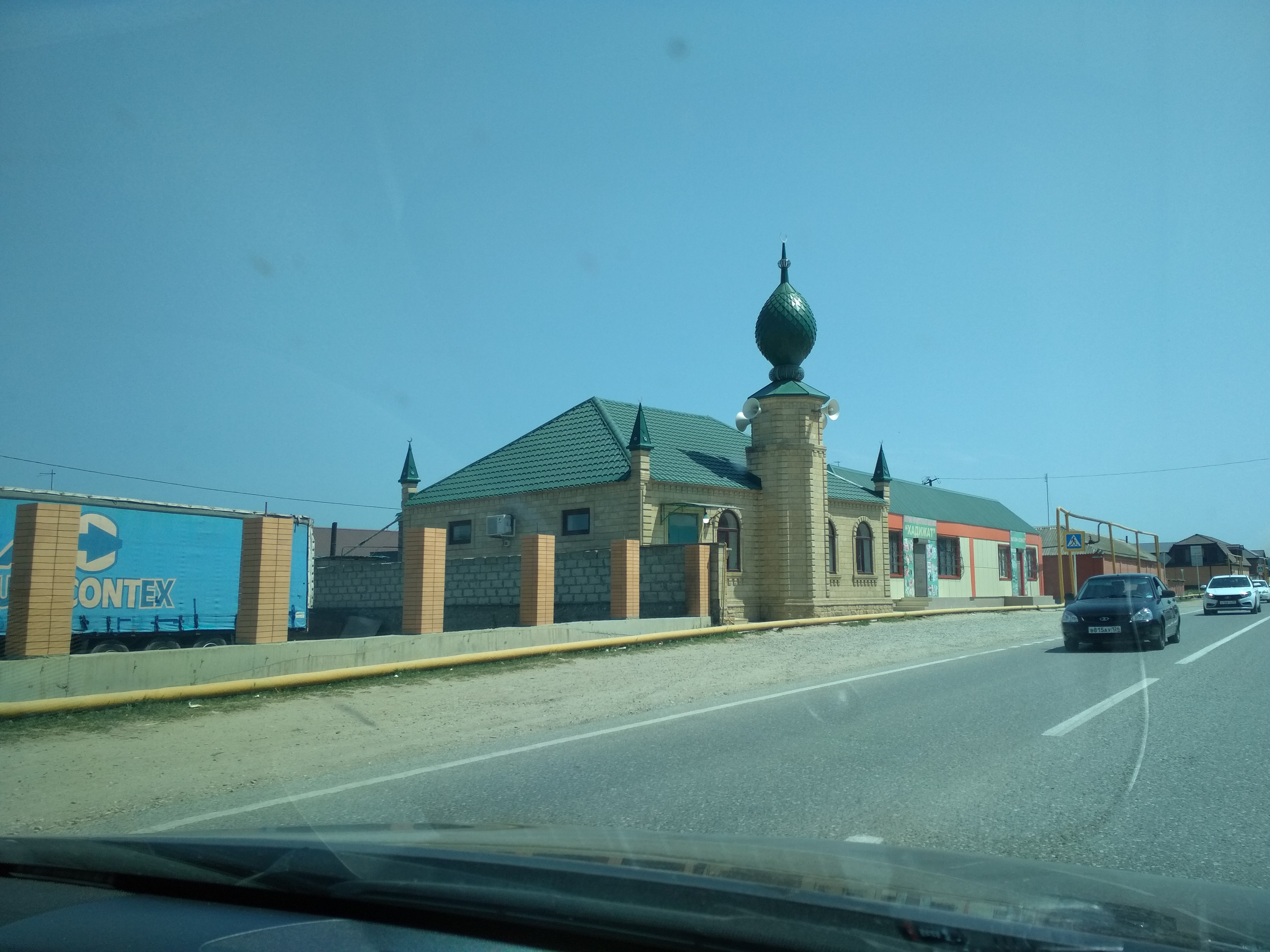 Нохчийн: БIаьчи-Юртара жамаIата маьждиг